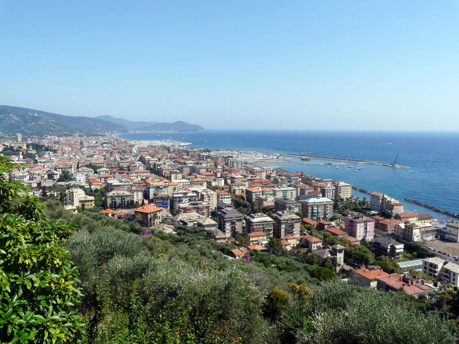 Panorama dalla SS 1 di Chiavari, Liguria, Italia